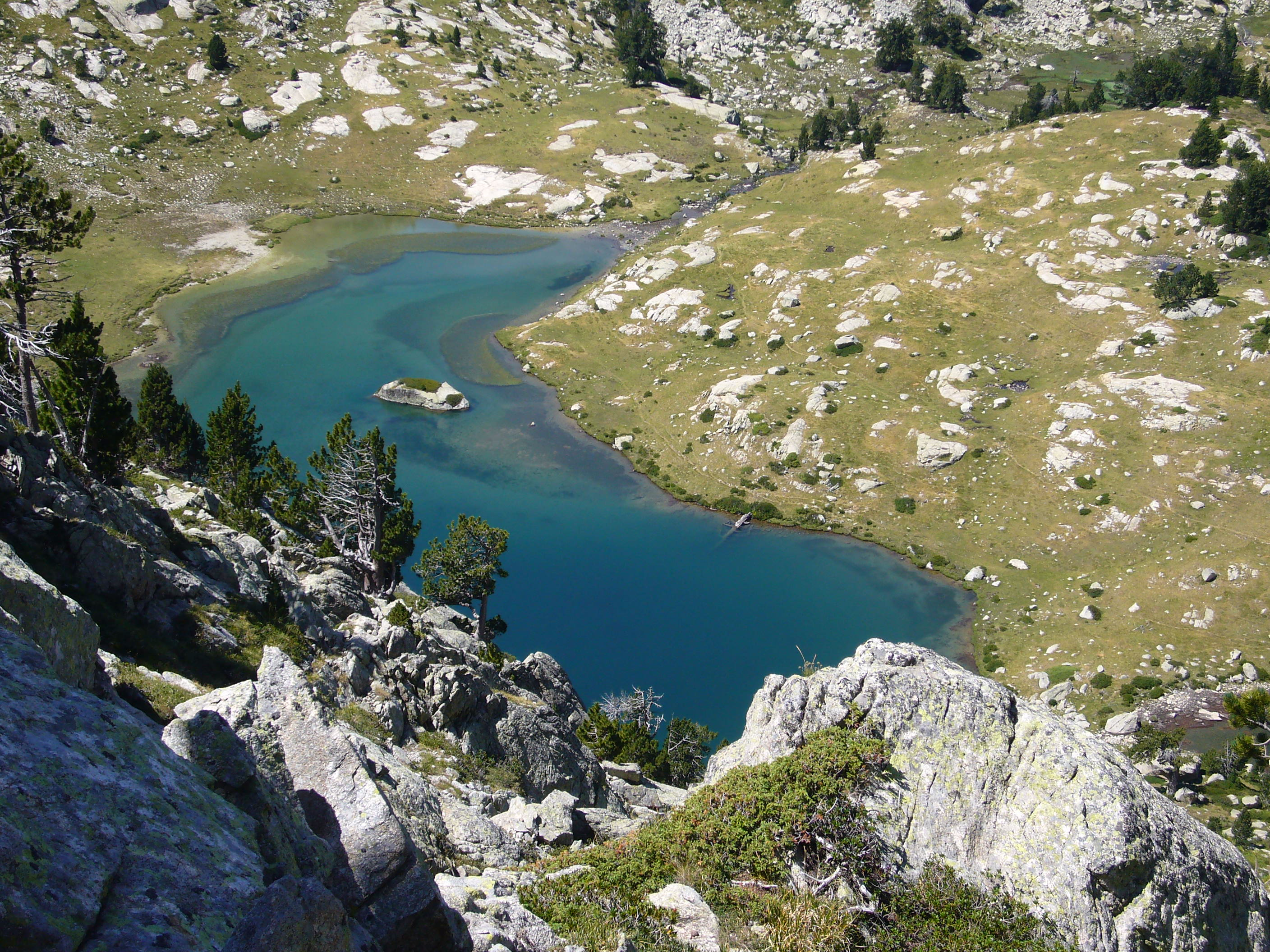 Estany de la Coma d'Amitges; la Vall de Boí, Alta Ribagorça, Catalunya